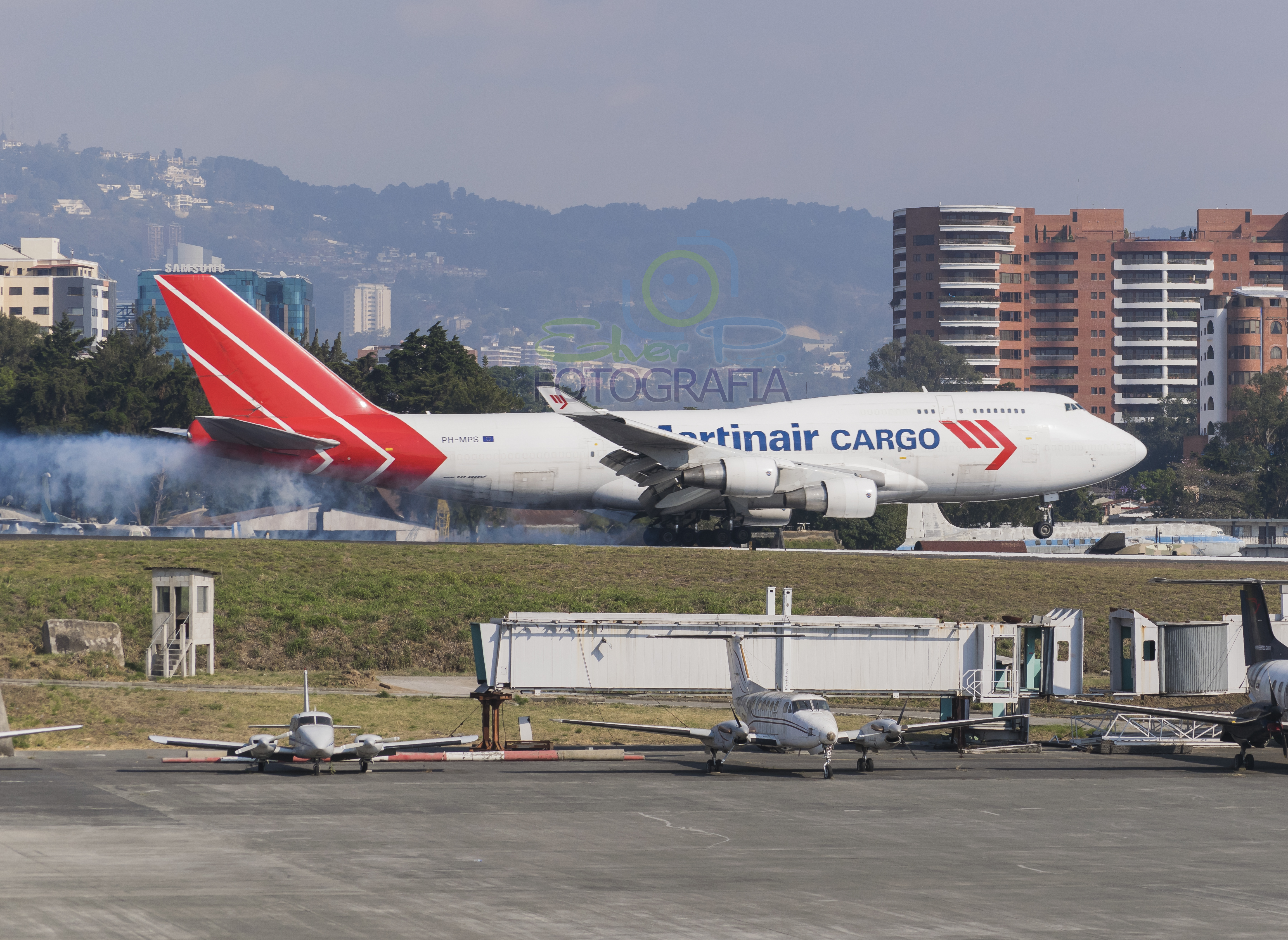 quemando llantas